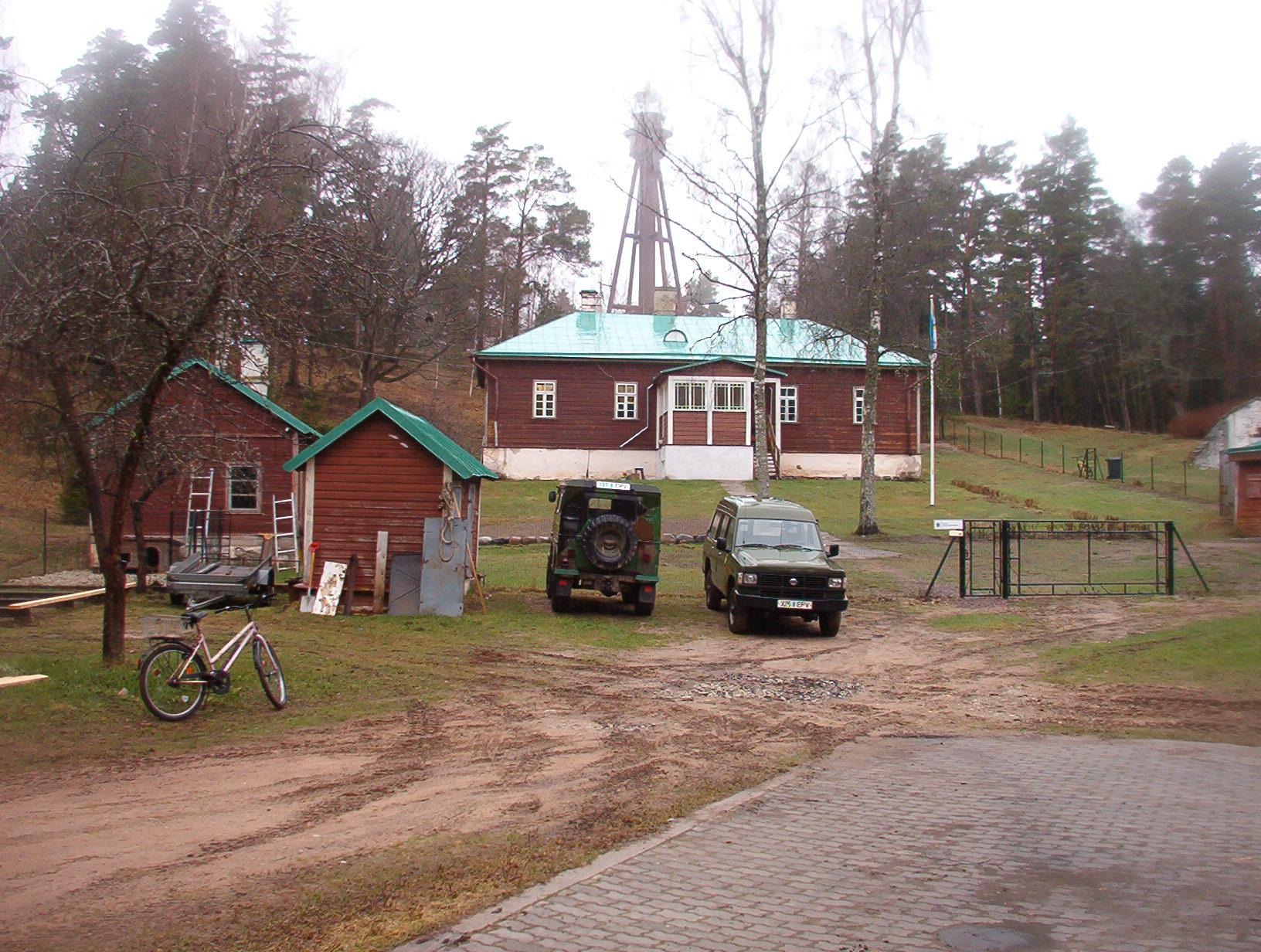 Ruhnu tuletorni ülevaataja elamu